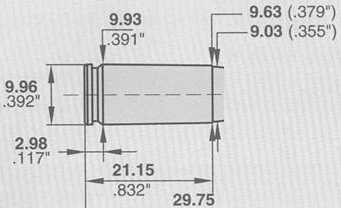 Dimensioni di un proiettile calibro 9x21 IMI